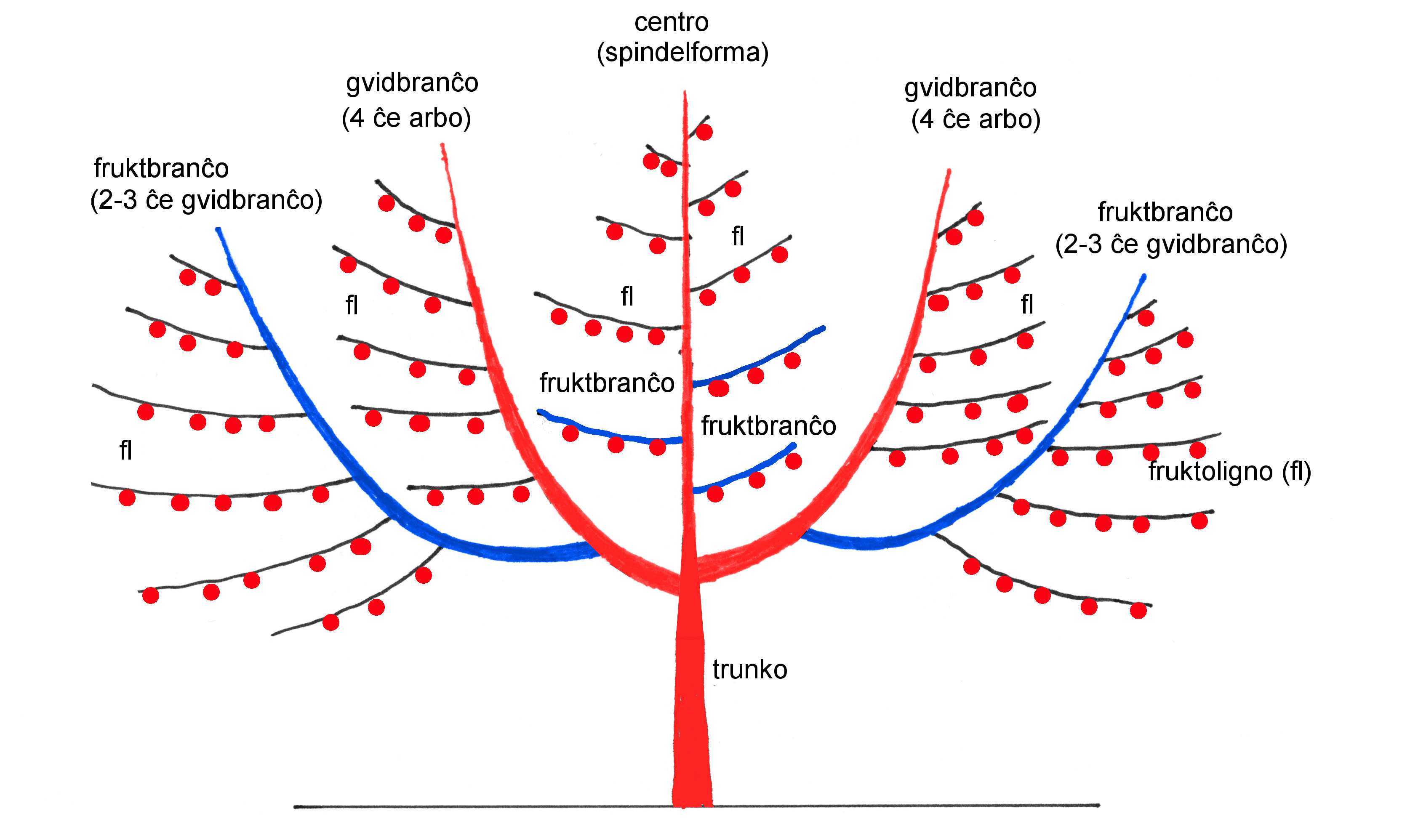 skemo de stucado laŭ metodo Oeschberg